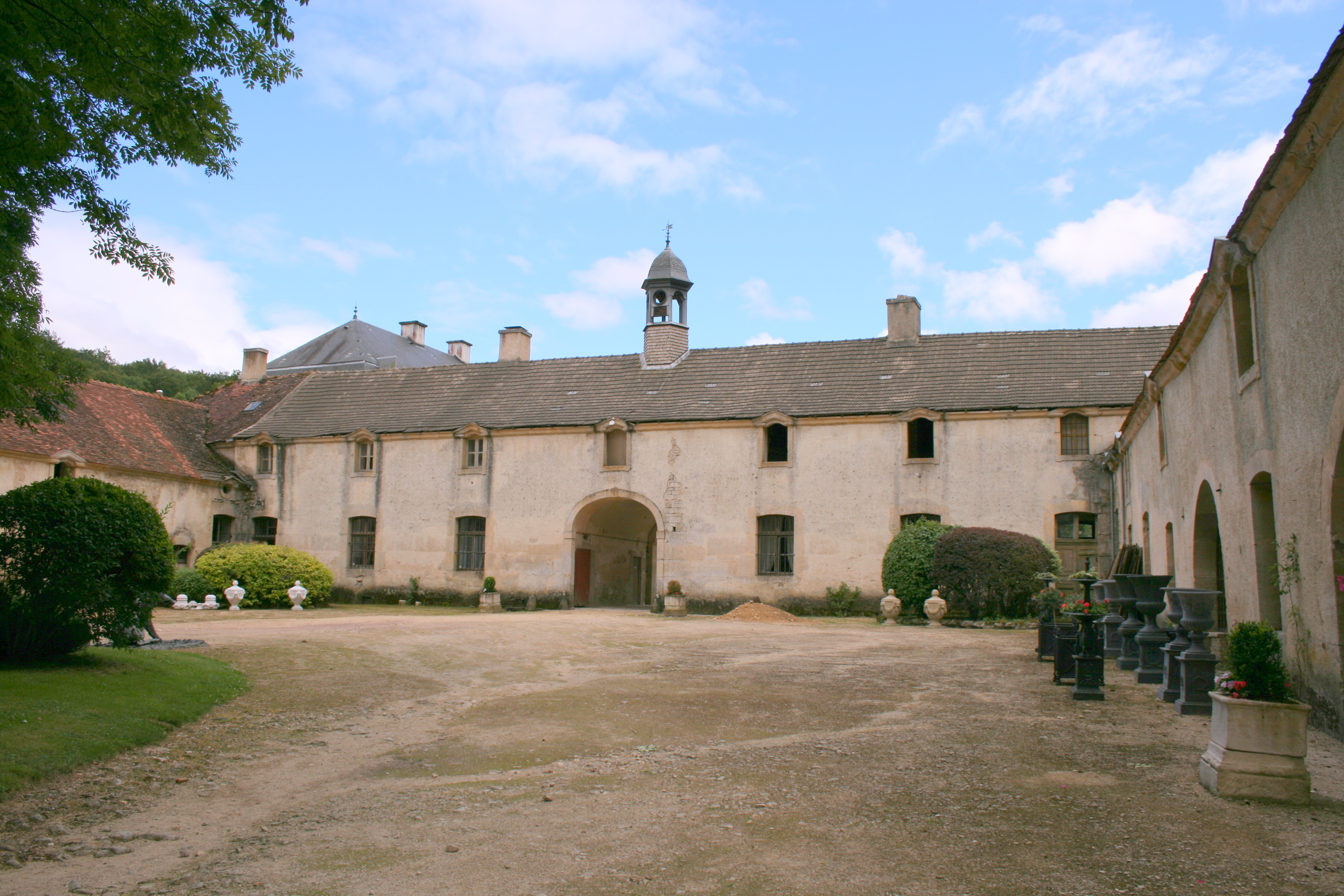 Abbaye du Val des Choues vue de la cour